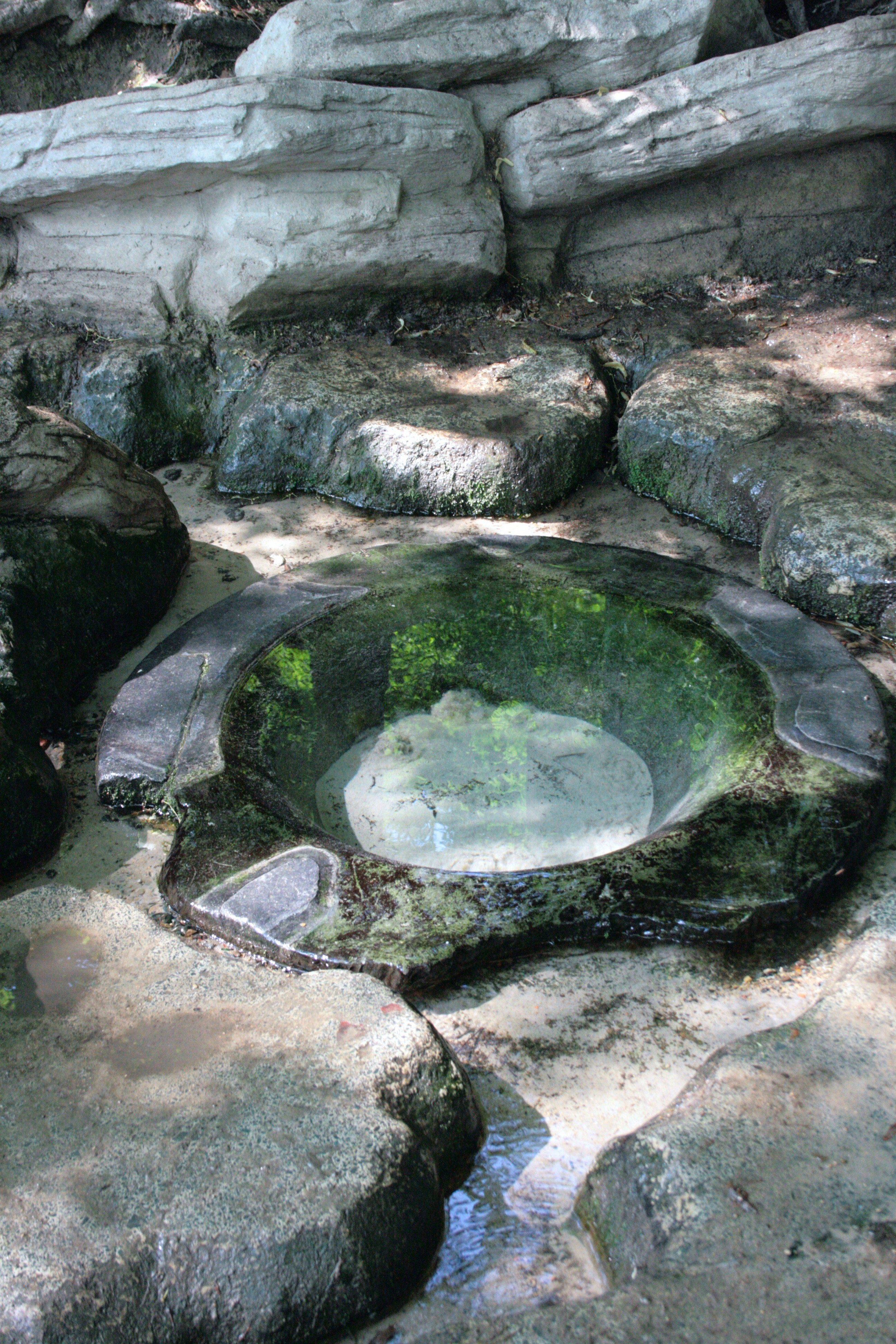 Parc Josaphat, Schaerbeek (Bruxelles), Belgique. Fontaine d'Amour